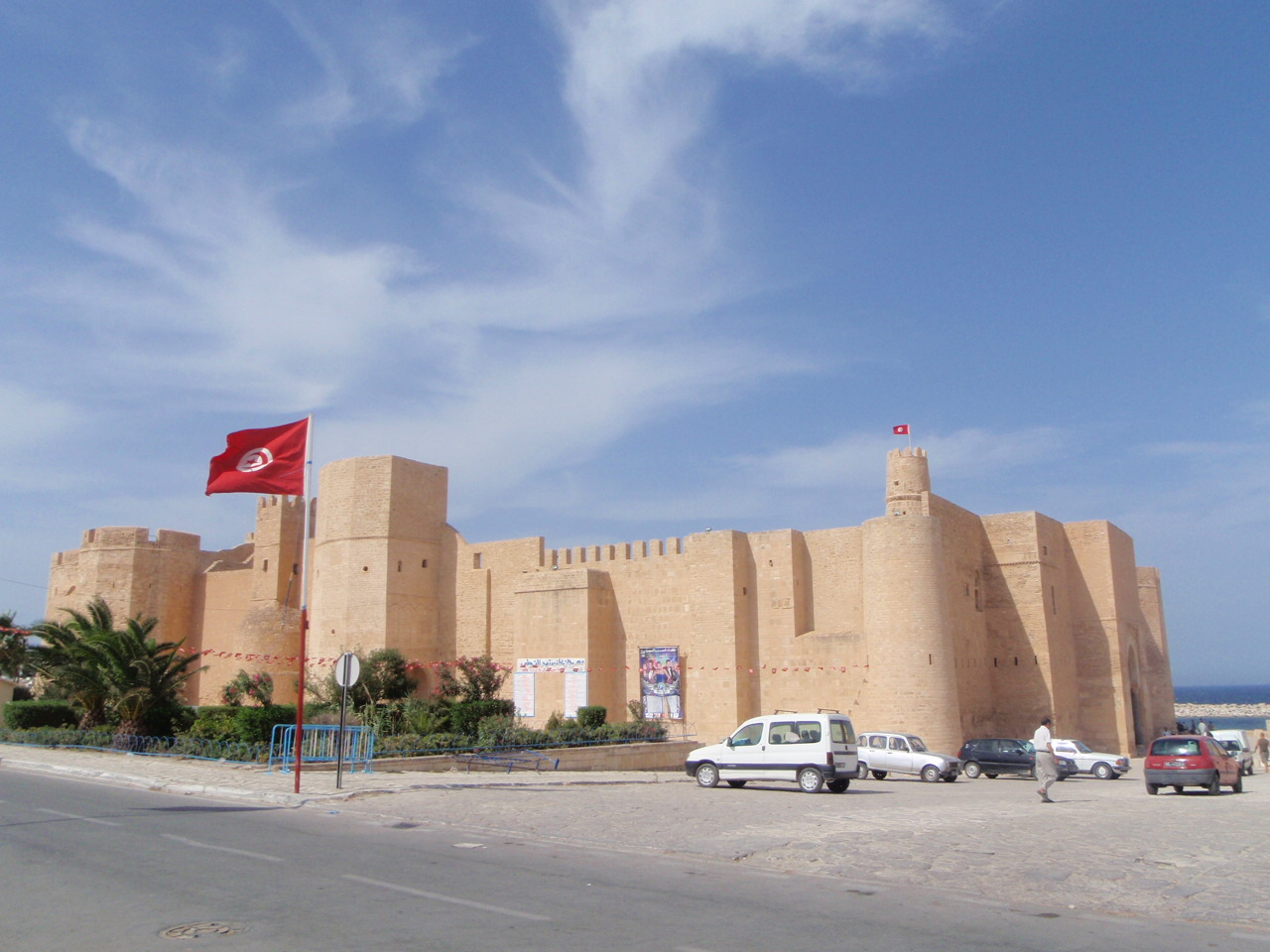 Monastir - Ribat, arabische Burg